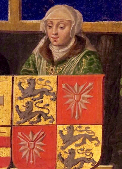 Hedvig af Holsten bag sit familievåben, fra anetavle i Rosenborg Slot, København